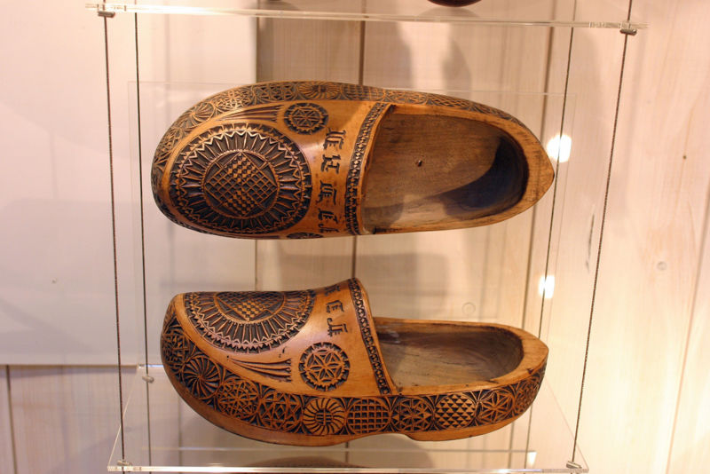 תמונה ע"י ניר נוסבאום קבקבי עץ עתיקים מעוטרים